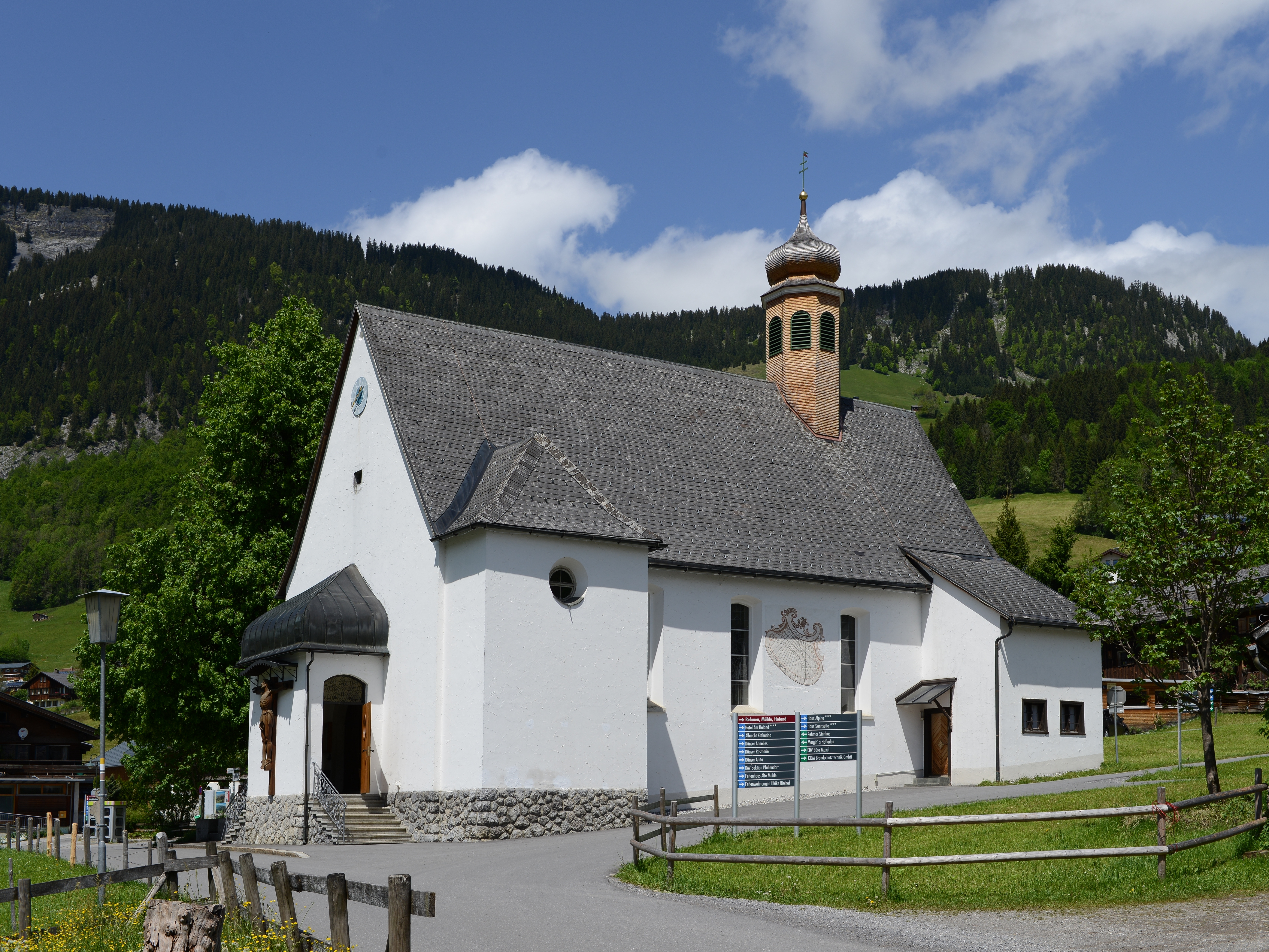 Kuratienkirche Hl. Josef, in Au-Rehmen. 1664 erbaut, Anfang 18. Jh. vergrößert, 1717 geweiht.